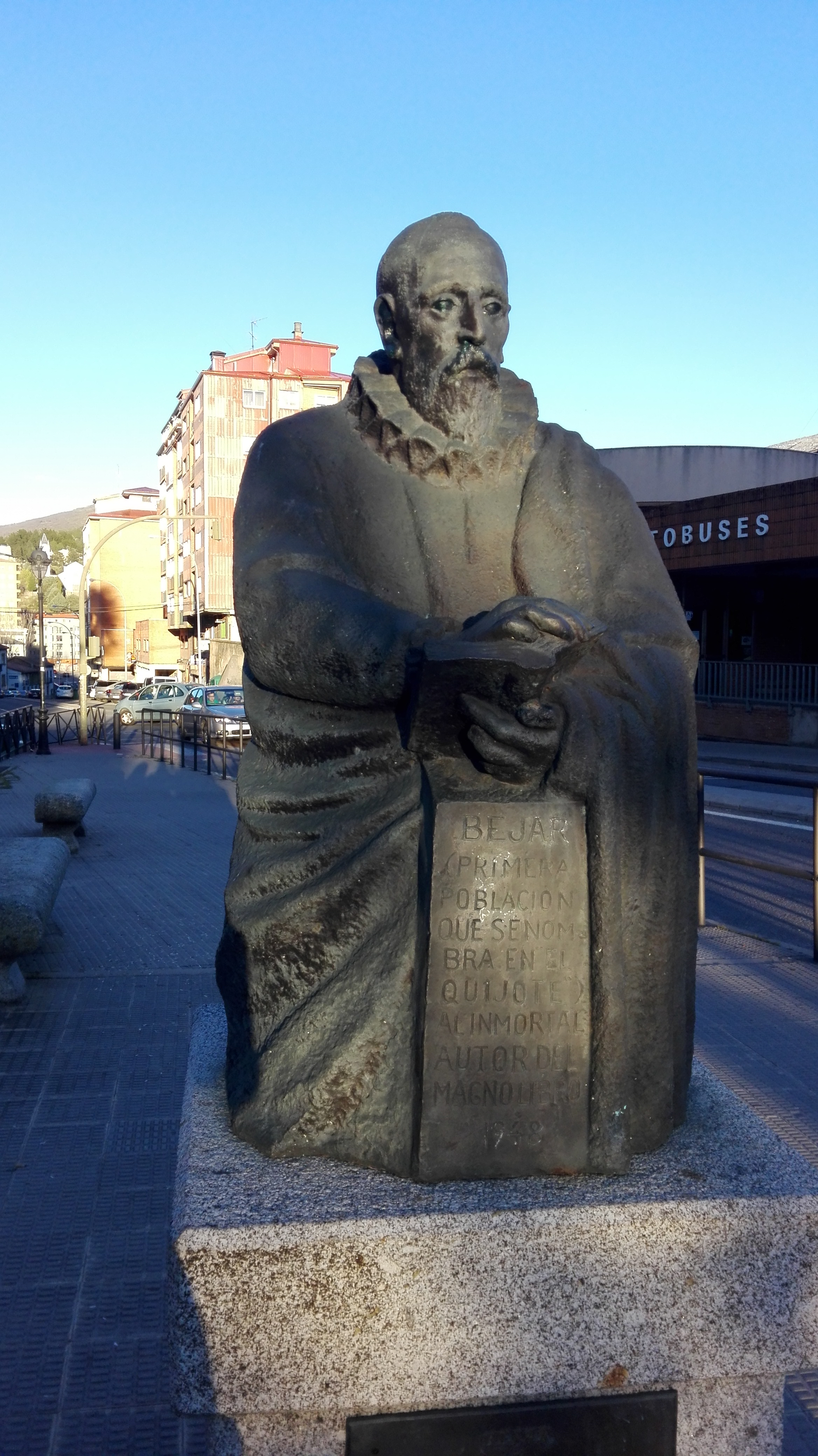 تمثال لميجيل دي ثيربانتس في بيخار..